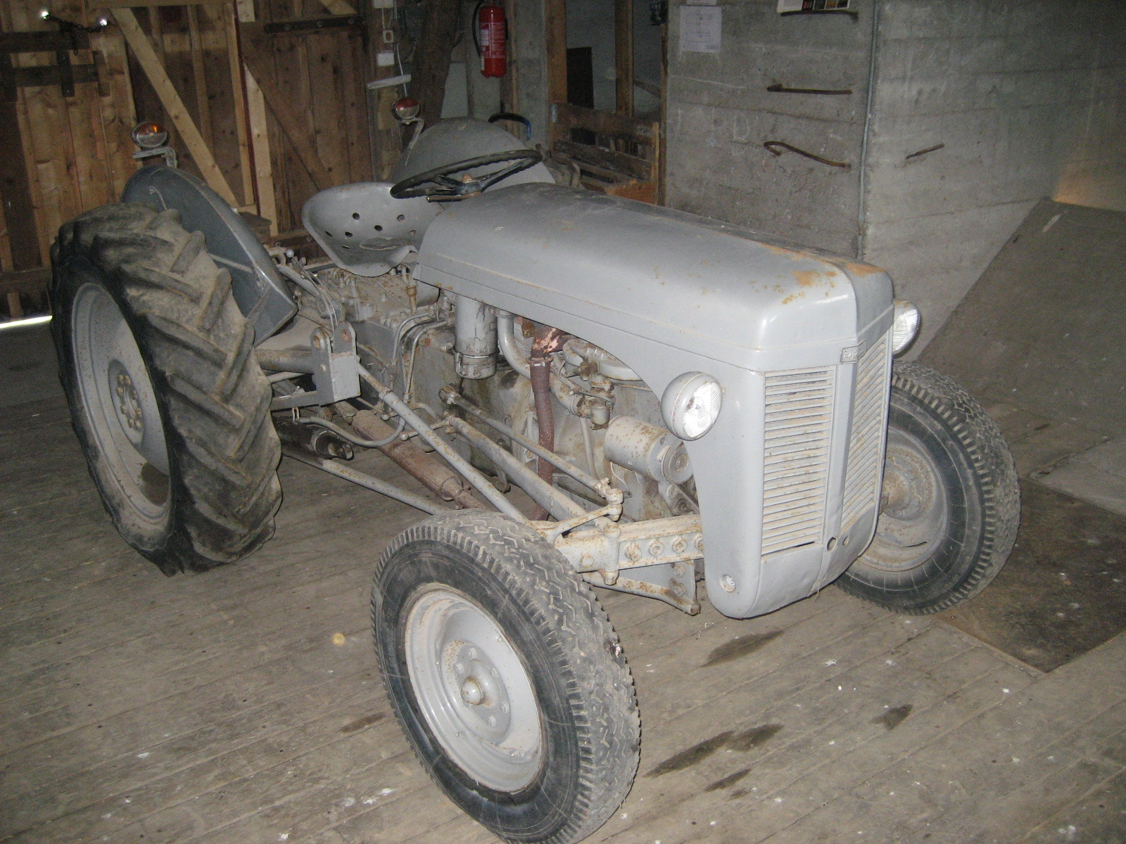 Ferguson traktor. Utstild ved Lyngdal Jordbruksmuseum